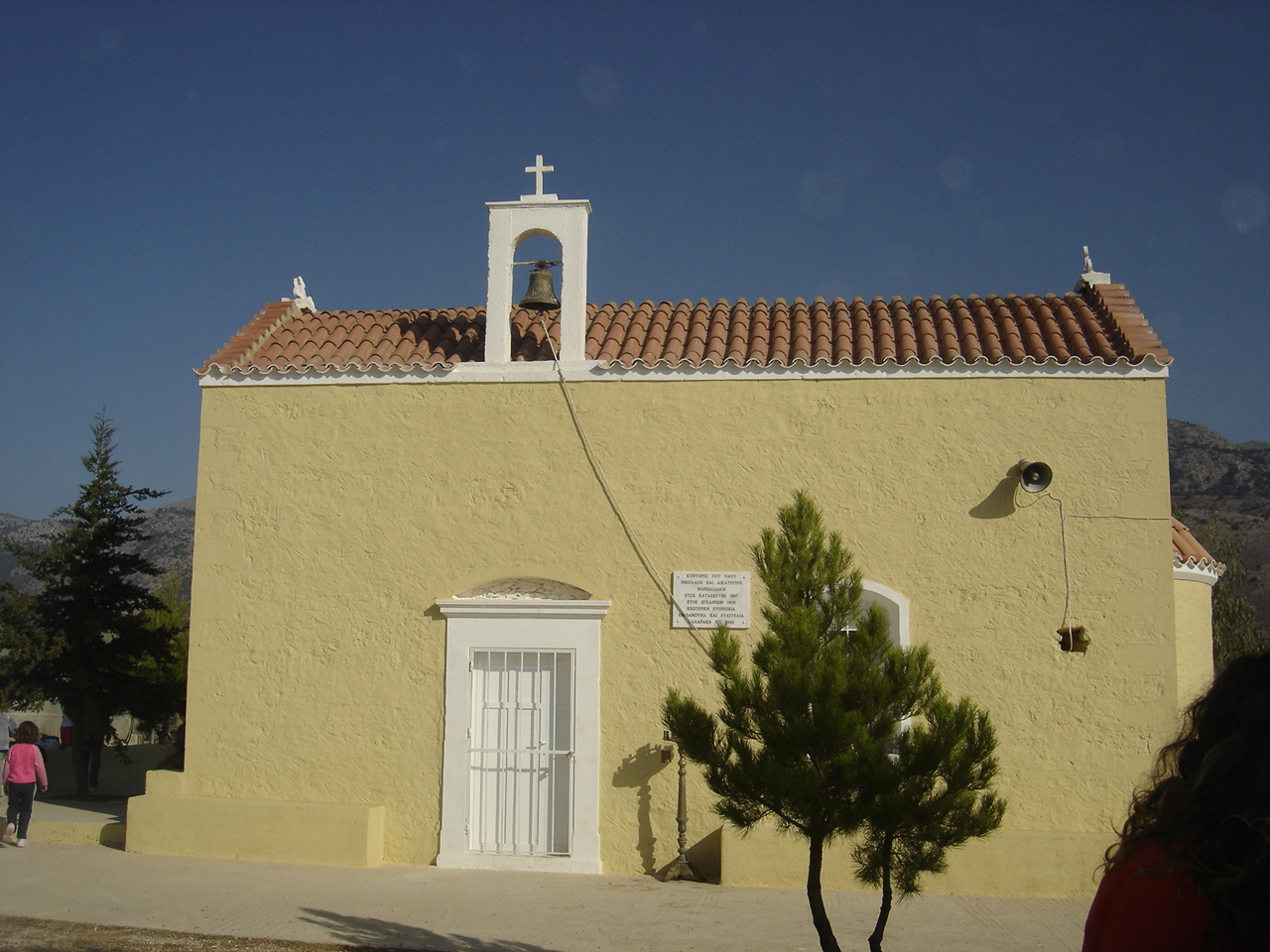 Αφέντη Χριστός